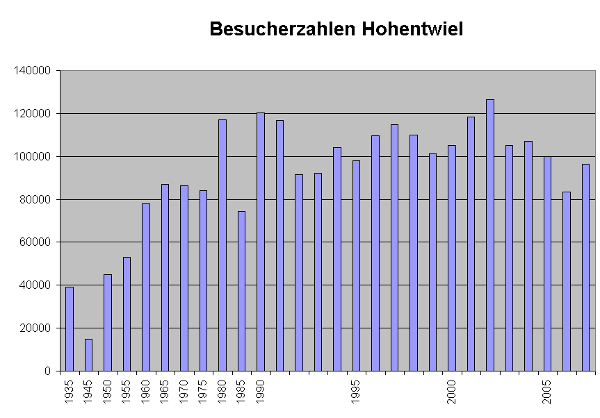 Die Besucherzahlen für die Festung Hohentwiel in den angegebenen Jahren.